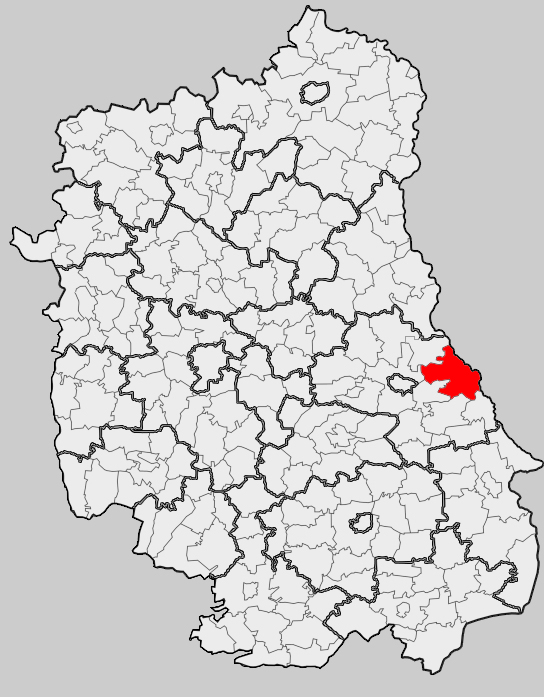 Map of gmina Dorohusk, Chełm county, Lublin voivodship Mapa gminy Dorohusk, powiat chełmski, województwo lubelskie